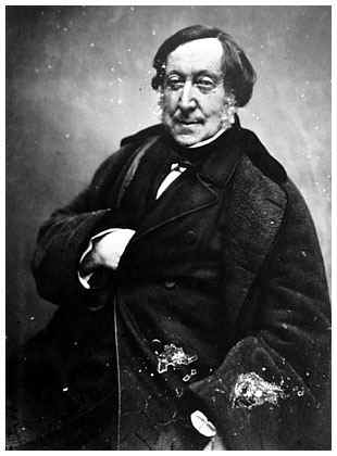 Titel: Gioacchino Rossini Fotograph: Félix Nadar